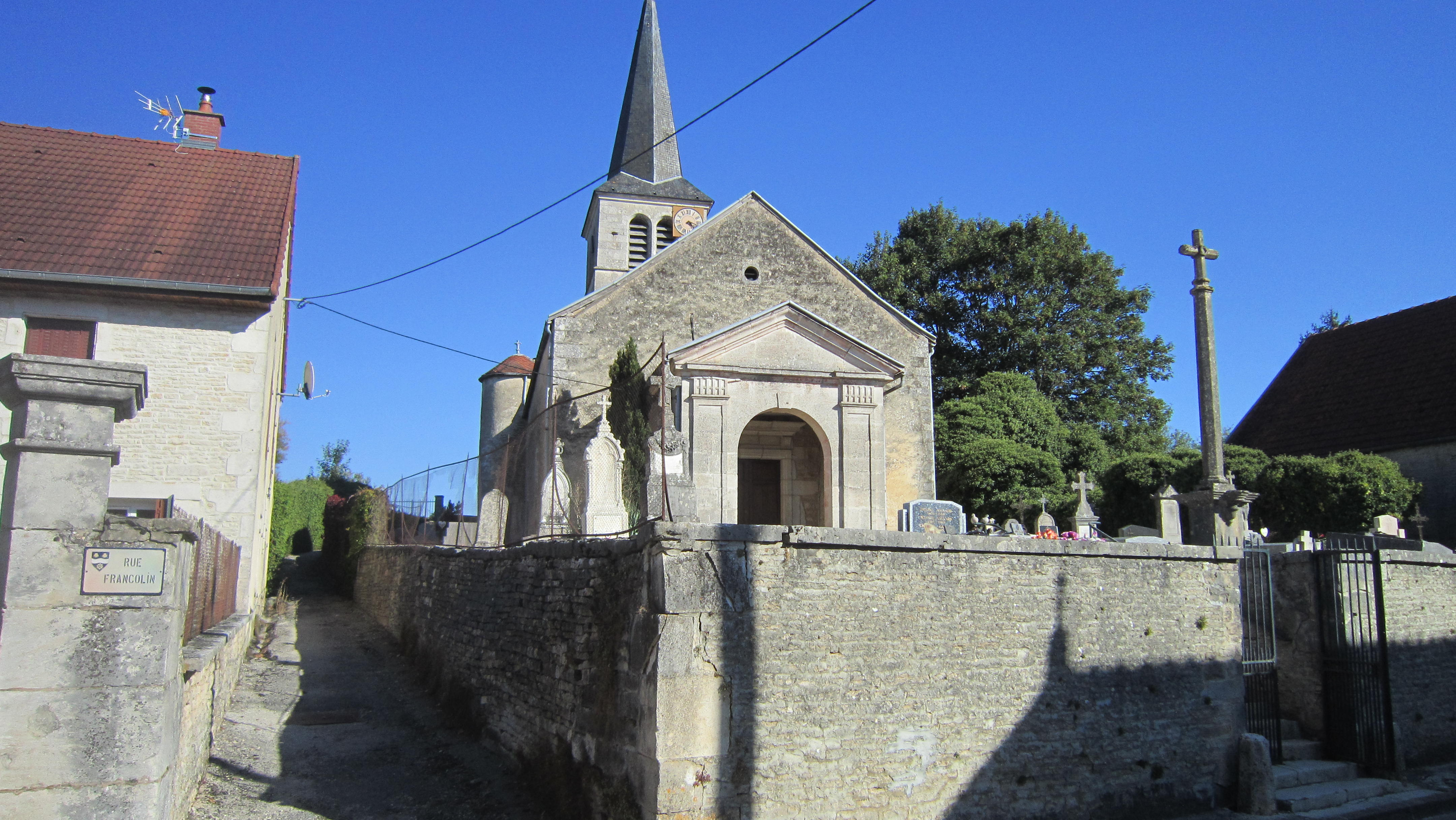 Eglise de Villotte-sur-Ource (Côte-d'Or)